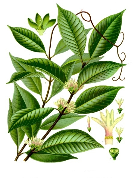 Willughbeia coriacea. A blühender Zweig; B nichtblühender Zweig mit Krallenranke; 1 Knospe; 2 aufgebrochene 5zipfelige Blüte; 3 aufgebrochene 4zipfelige Blüte; 4 Blütenröhre geöffnet; 5 Fruchtknoten, Tangentialschnitt, eine Samenleiste zeigend; 6 Fruchtknoten Querschnitt. A B 1—3 natürliche Grösse; 4—6 vergrössert.